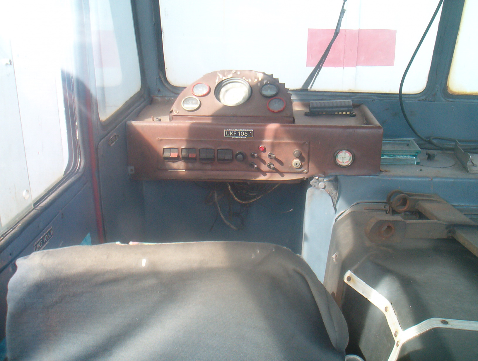 Kabina drezyny WM10 w skansenie w Jaworzynie Śląskiej drugie ujęcie